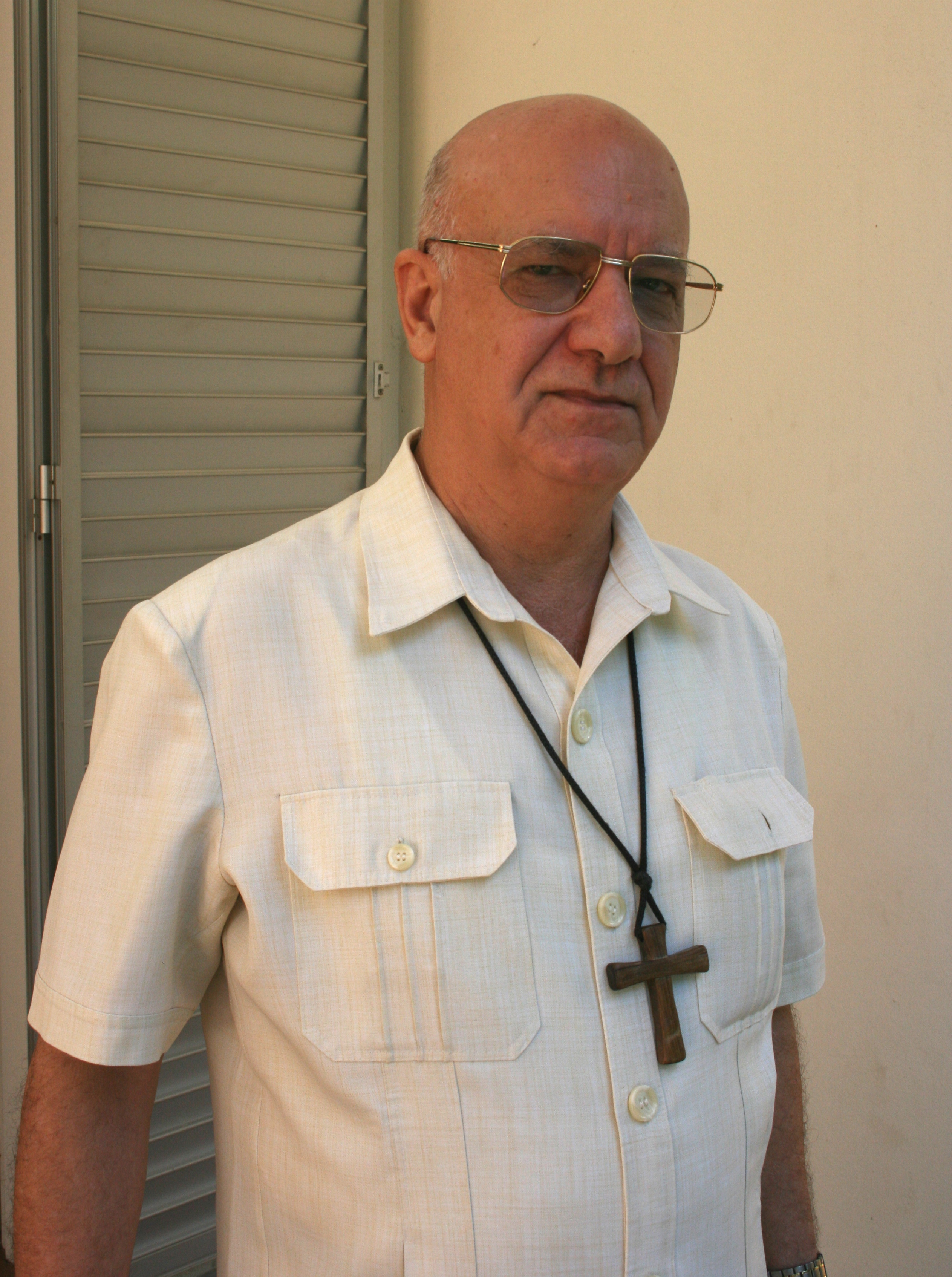 Monseigneur Gilbert Aubry à l'évêché de Saint-Denis de La Réunion.